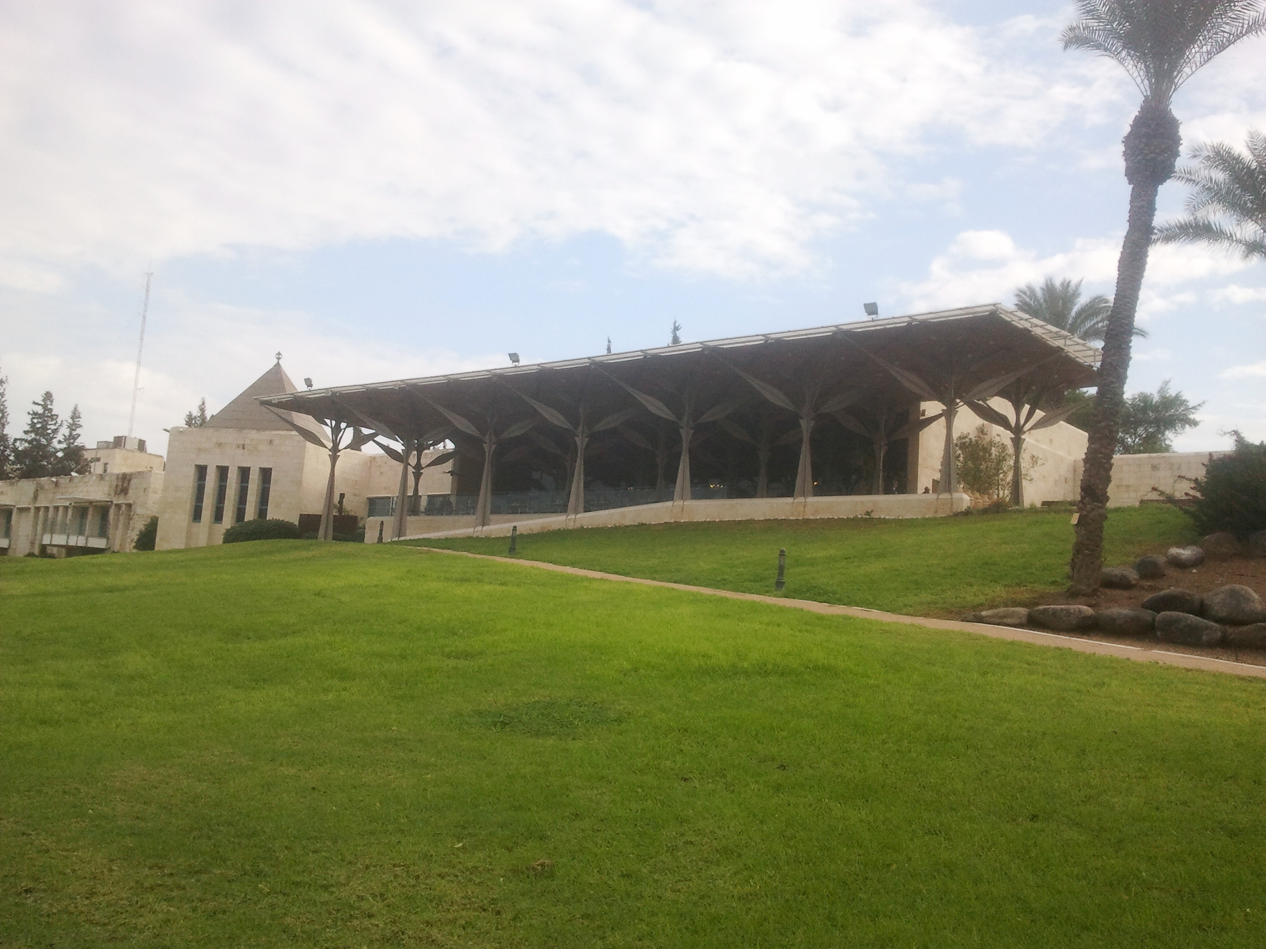 בית גבריאל בכנרת הוא מרכז תרבות על שפת ים כנרת, על יד צמח.